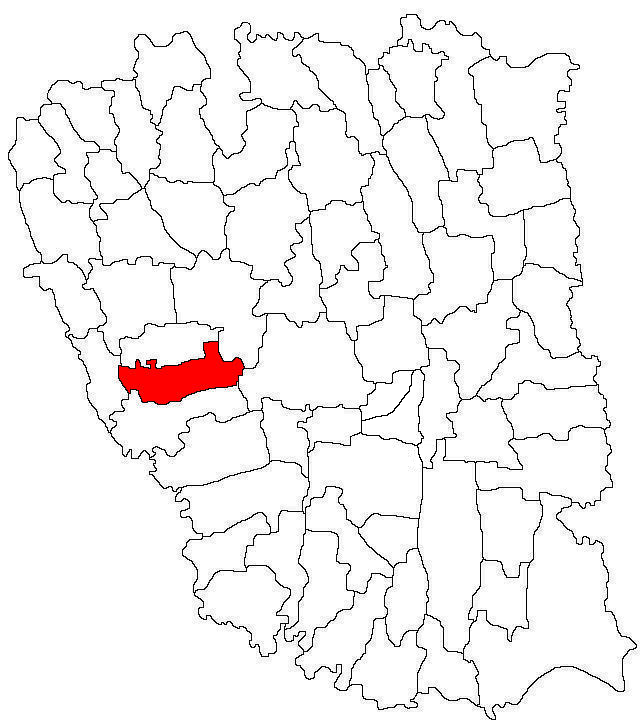 Categorie:Hărţi ale judeţului Galaţi